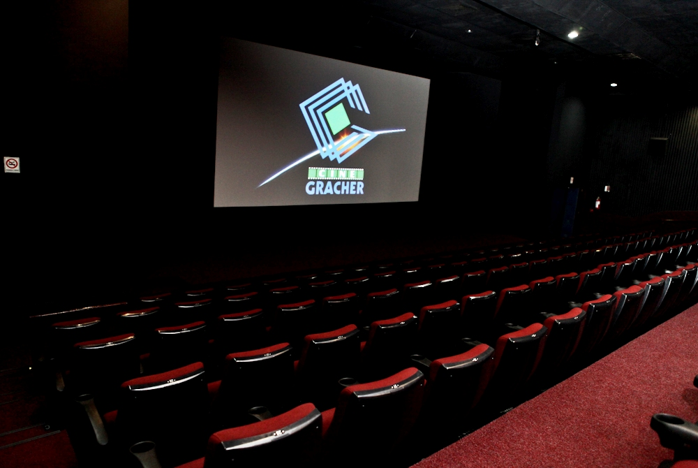 Vista da arquibancada do Cine Gracher Shopping de Brusque